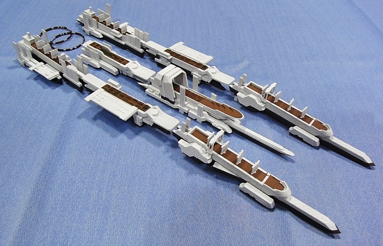 Figura a escala de Musashi la nave-ciudad, de la serie de anime Kyōkai Senjō no Horizon.